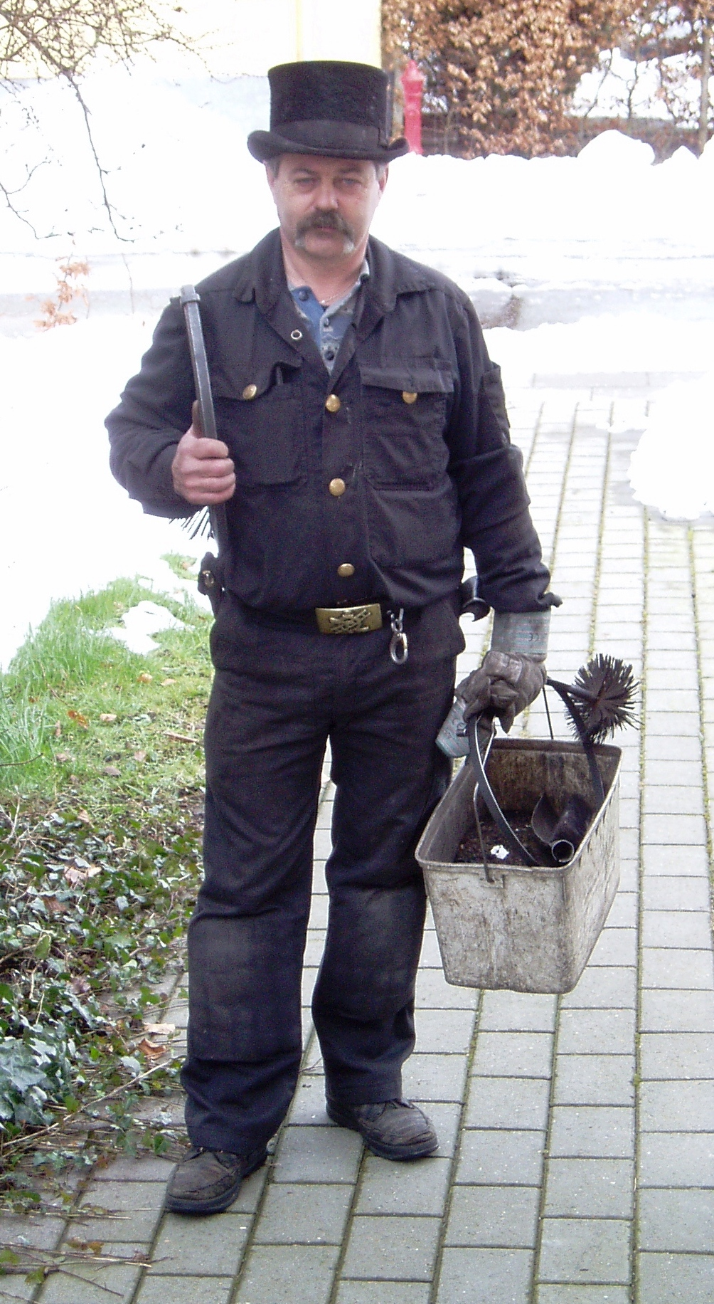 Chimney sweep - da: Skorstensfejer